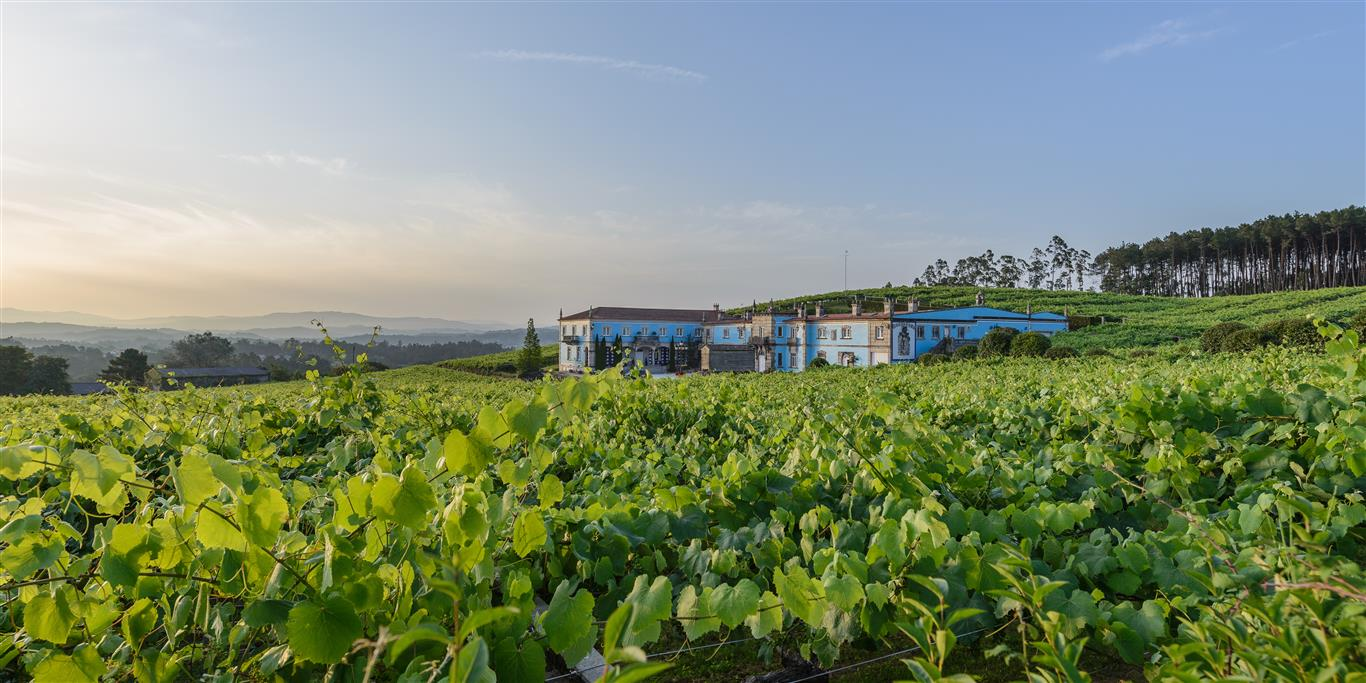 Bodega Grabazán en las Rías Baixas